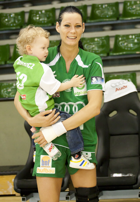 Görbicz Anita válogatott magyar kézilabdázó.